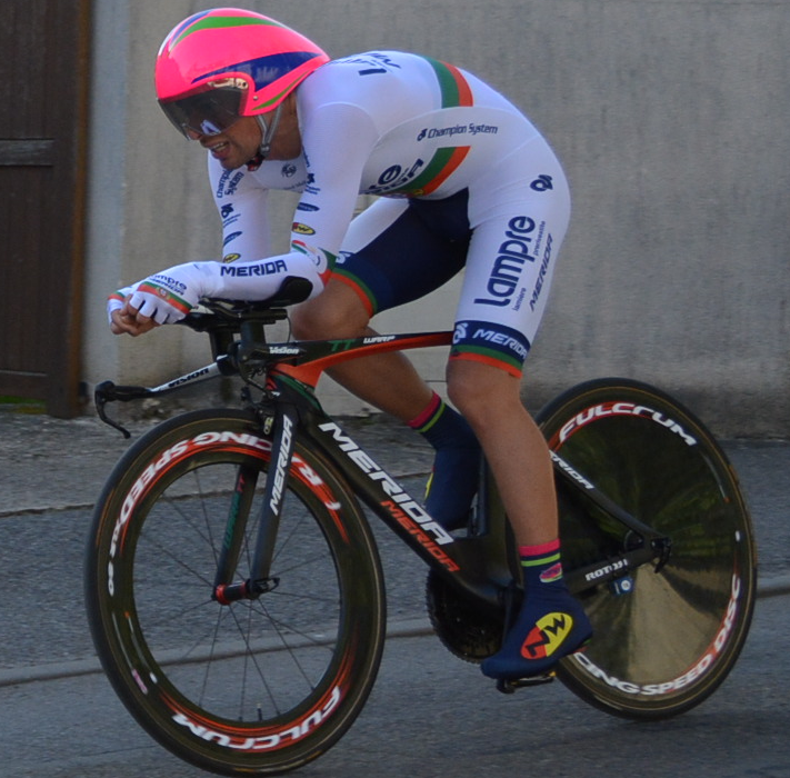 Nelson Oliveira à Paris-Nice 2015